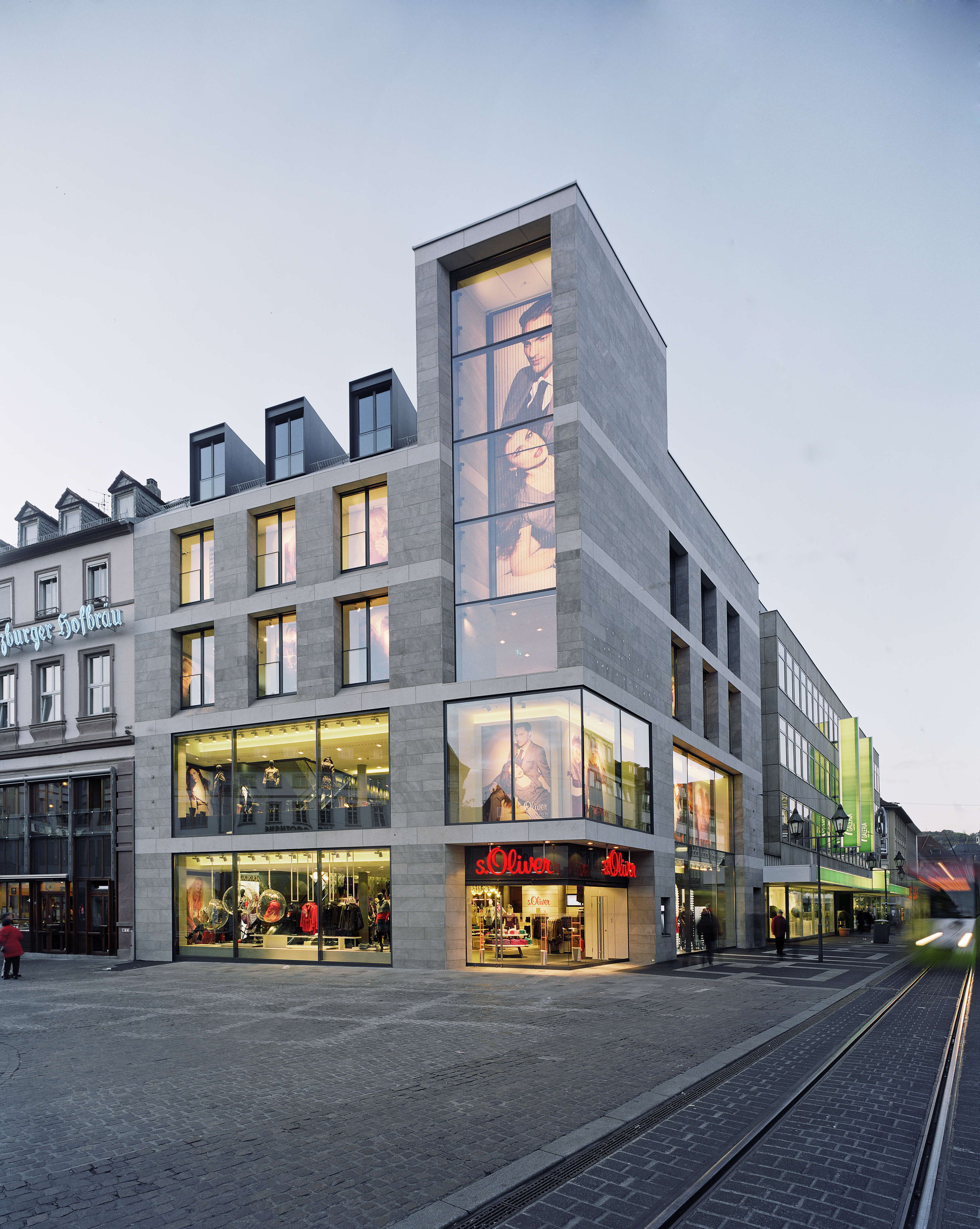 Das Bild zeigt den s.Oliver Store in Würzburg